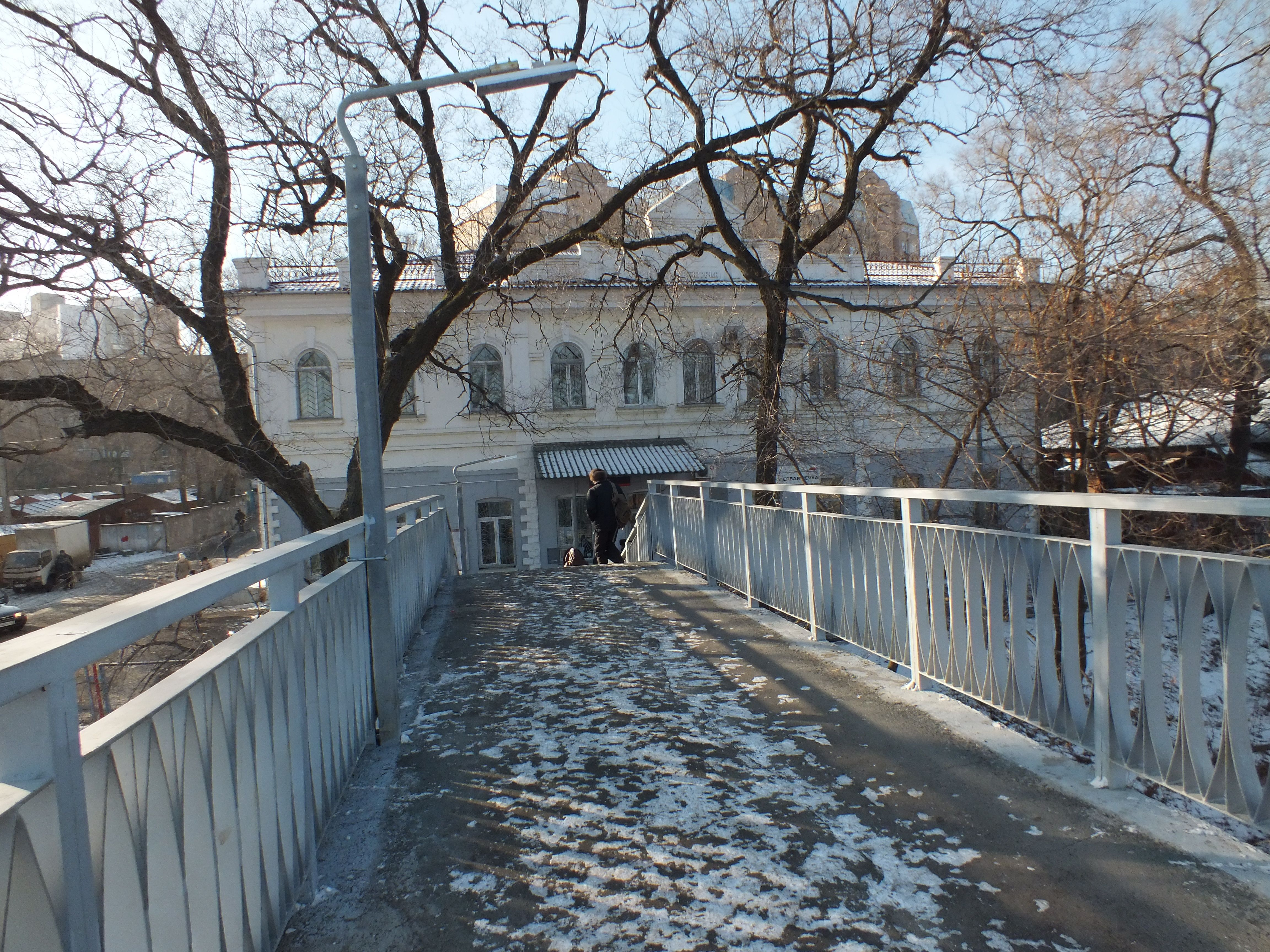 Первая Речка (станция)